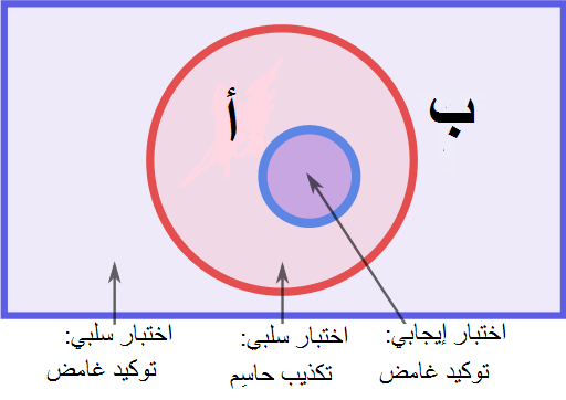 confirmation bias